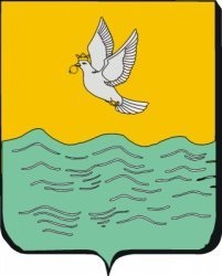 Familie Wapen Heldring